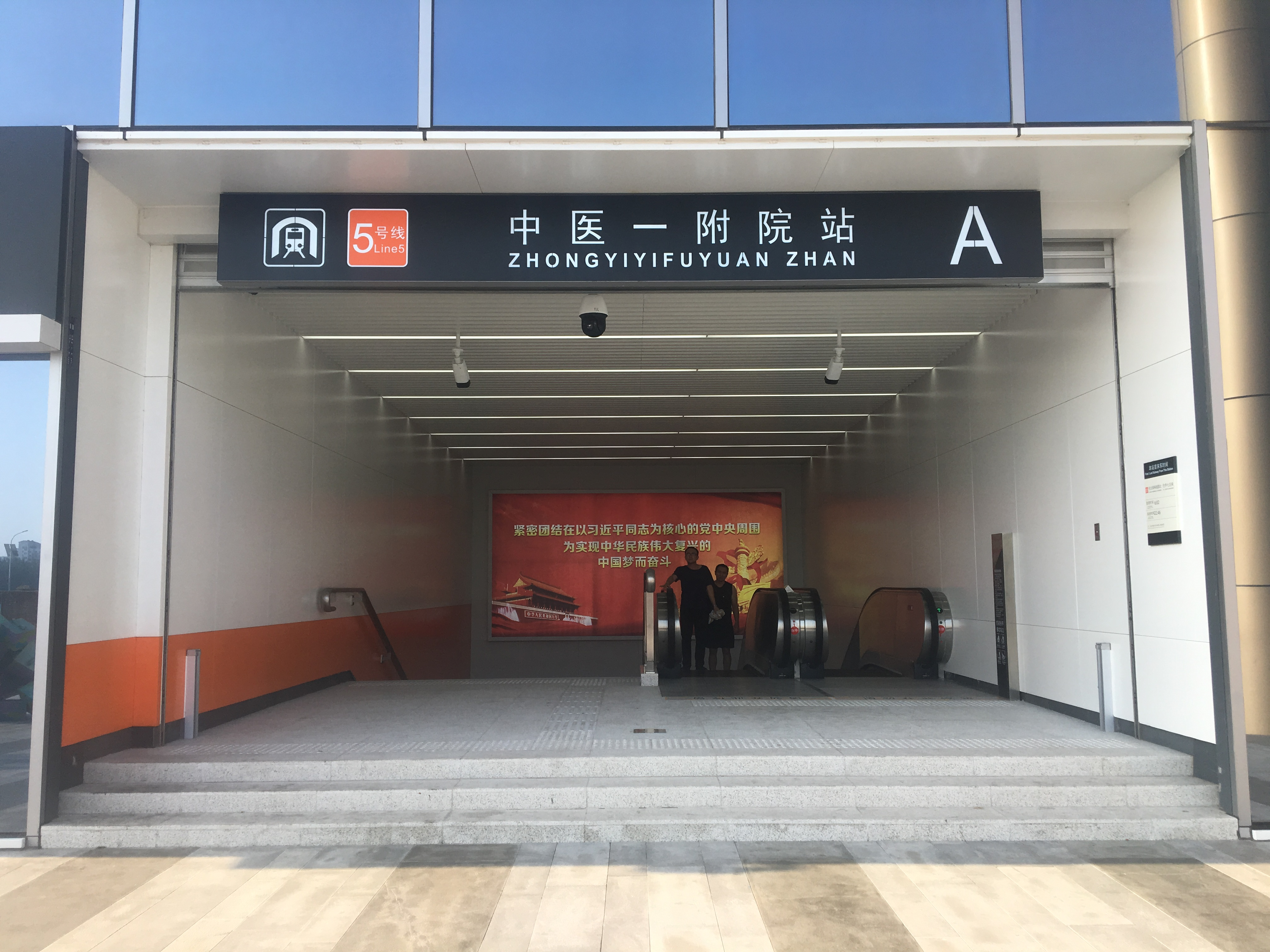 天津地铁5号线中医一附院站A口，位于东第万科广场底层，2019年7月25日开通